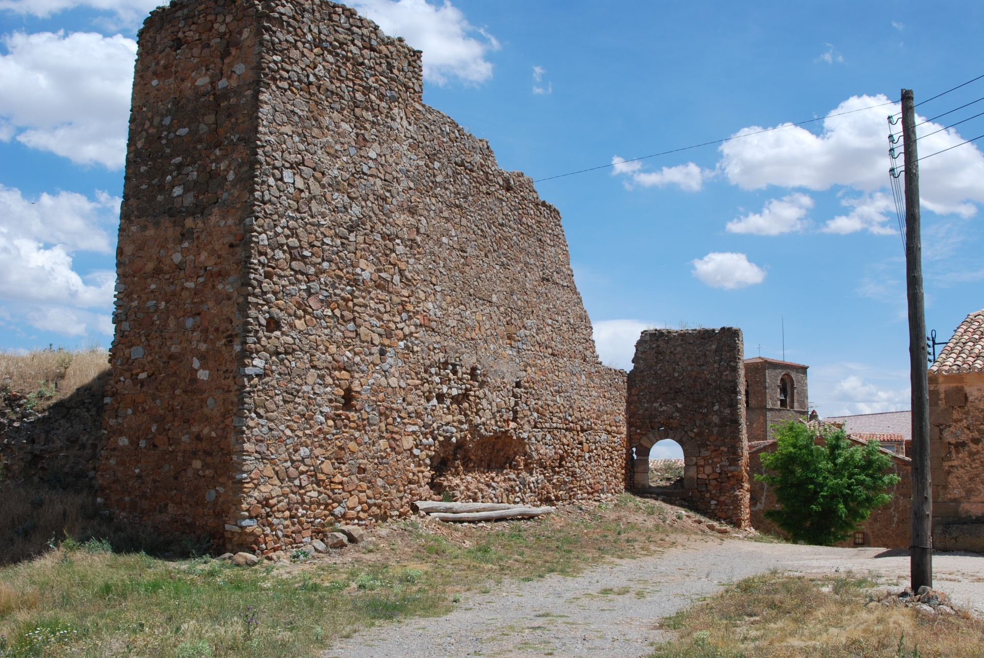 Castillo de Peroniel